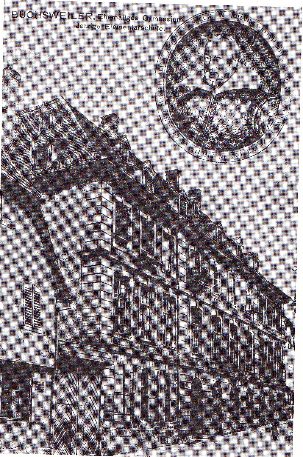 carte postale ancienne où figure le collège de Bouxwiller (Bas-Rhin) fondé par Johann Reinhard de Hanau-Lichtenberg (en médaillon).